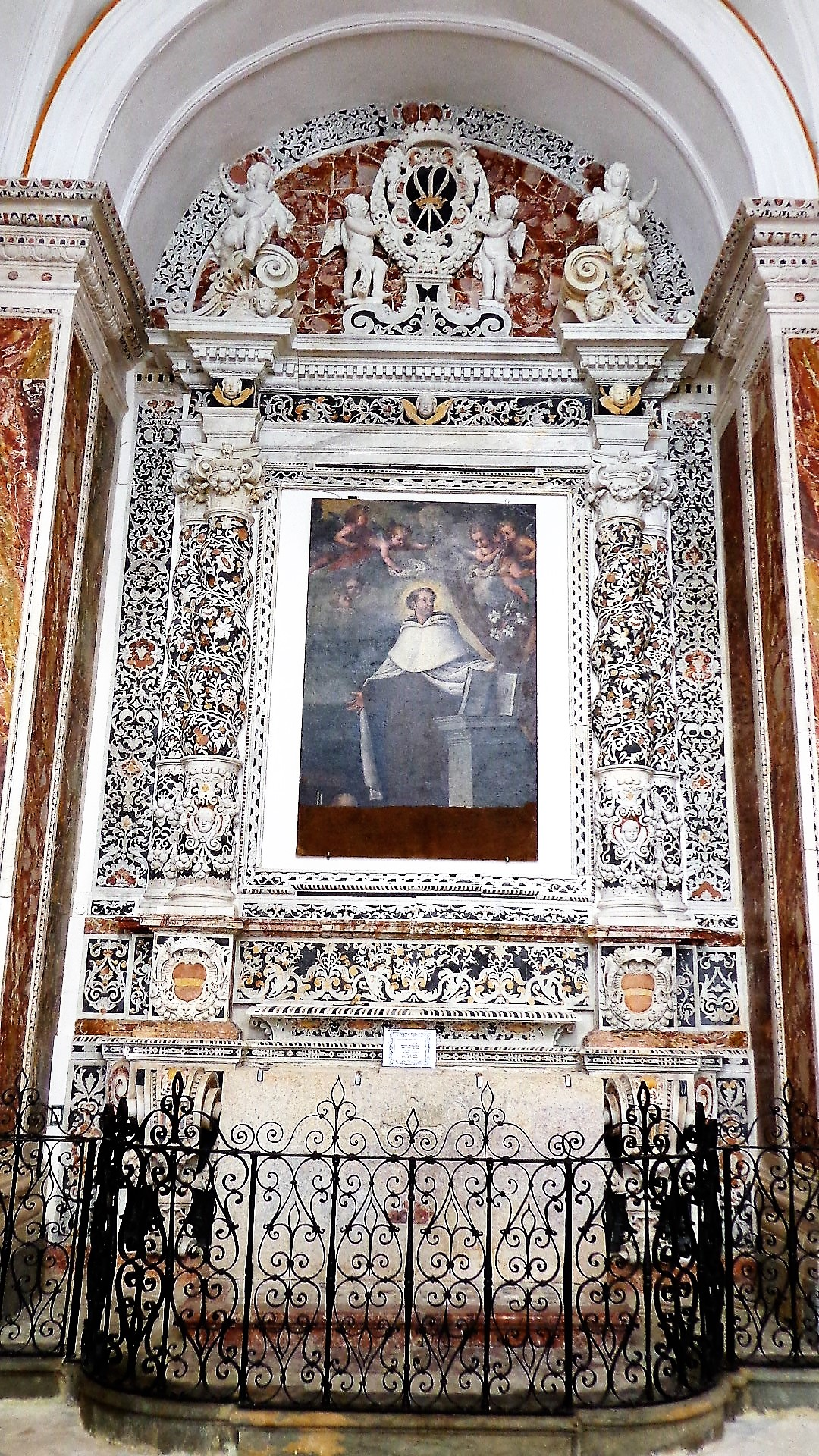 Altare laterale